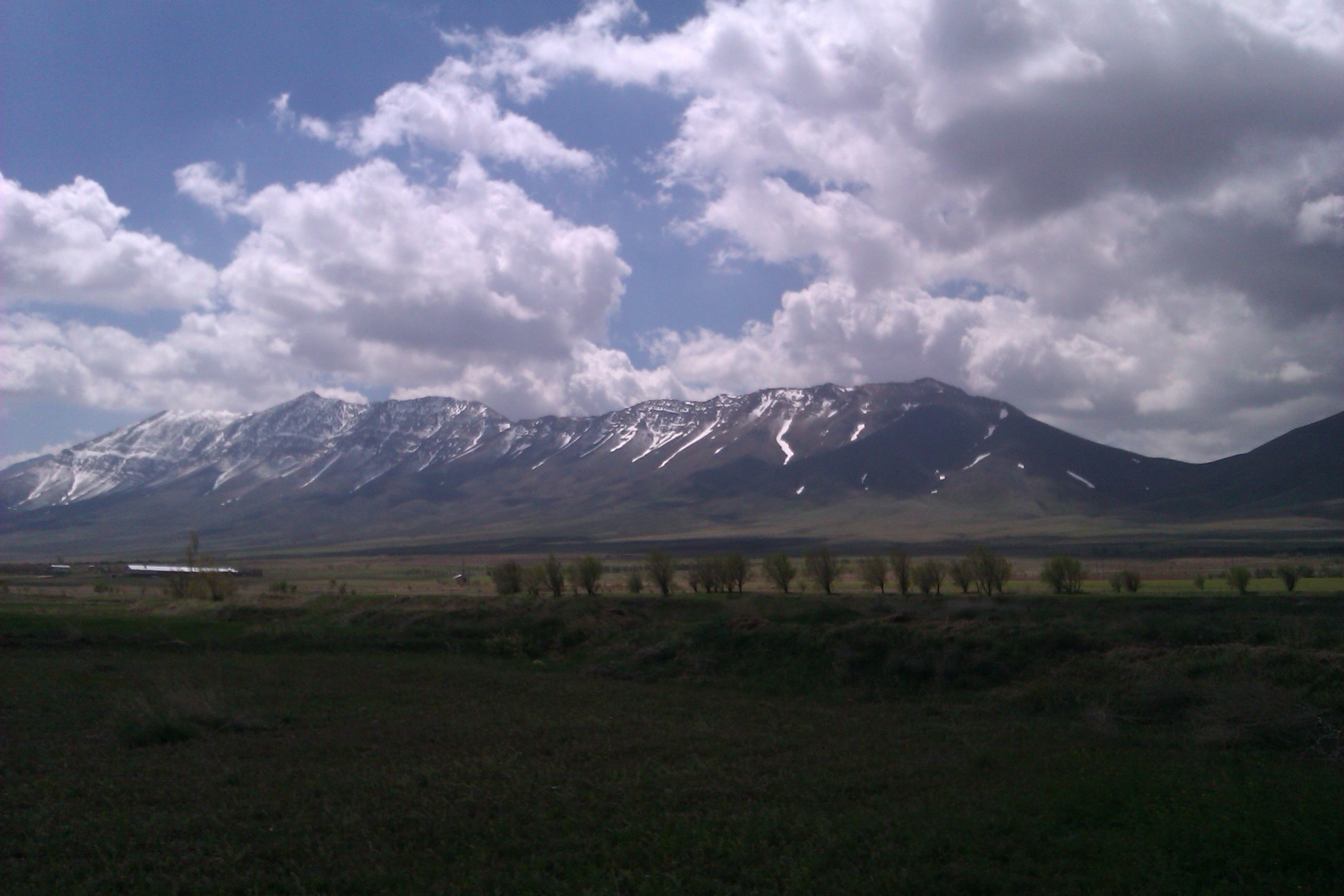 رشته کوههای کمر بسته روستای فرج آبادر